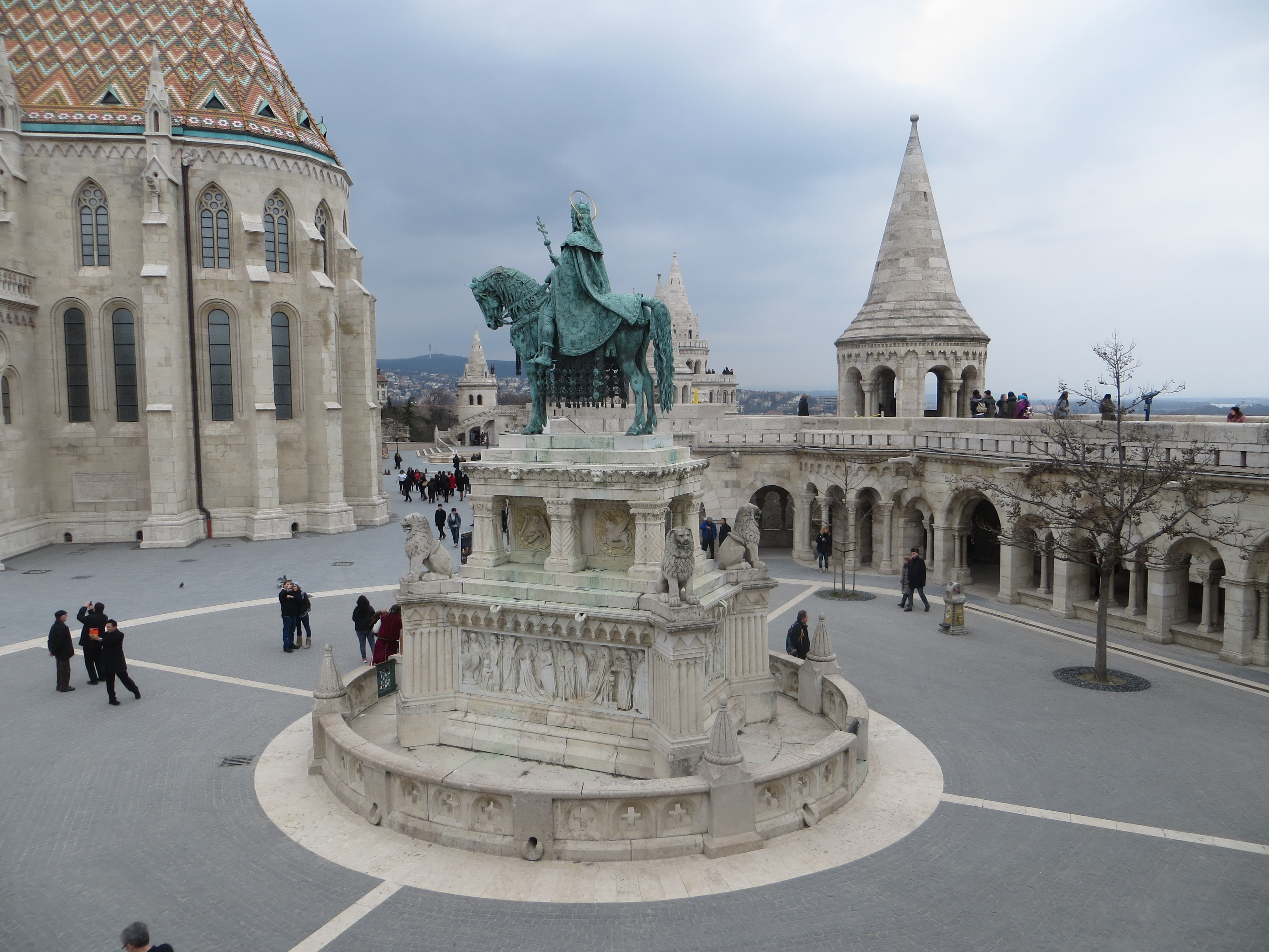 Szent István király szobra a Halászbástya déli bástyaudvarán